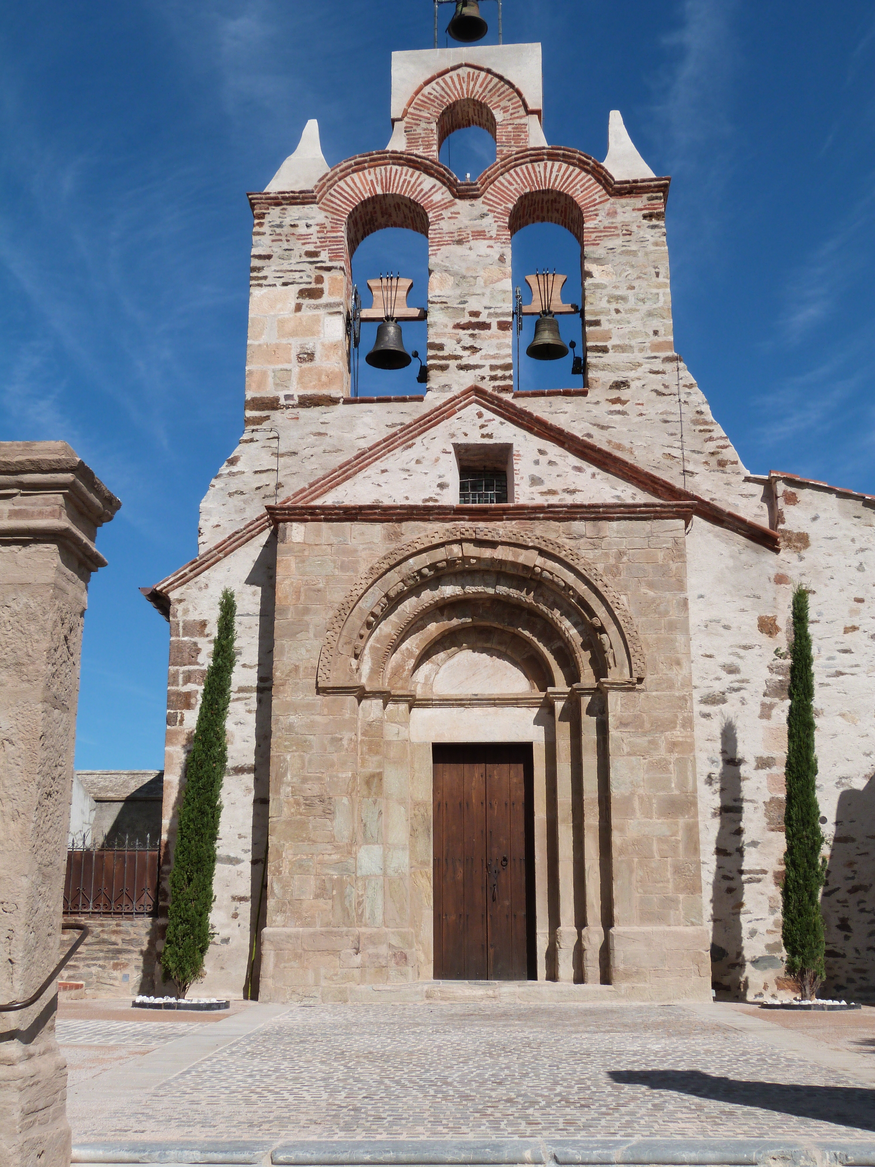 Église Saint-Jean de la Rectoria